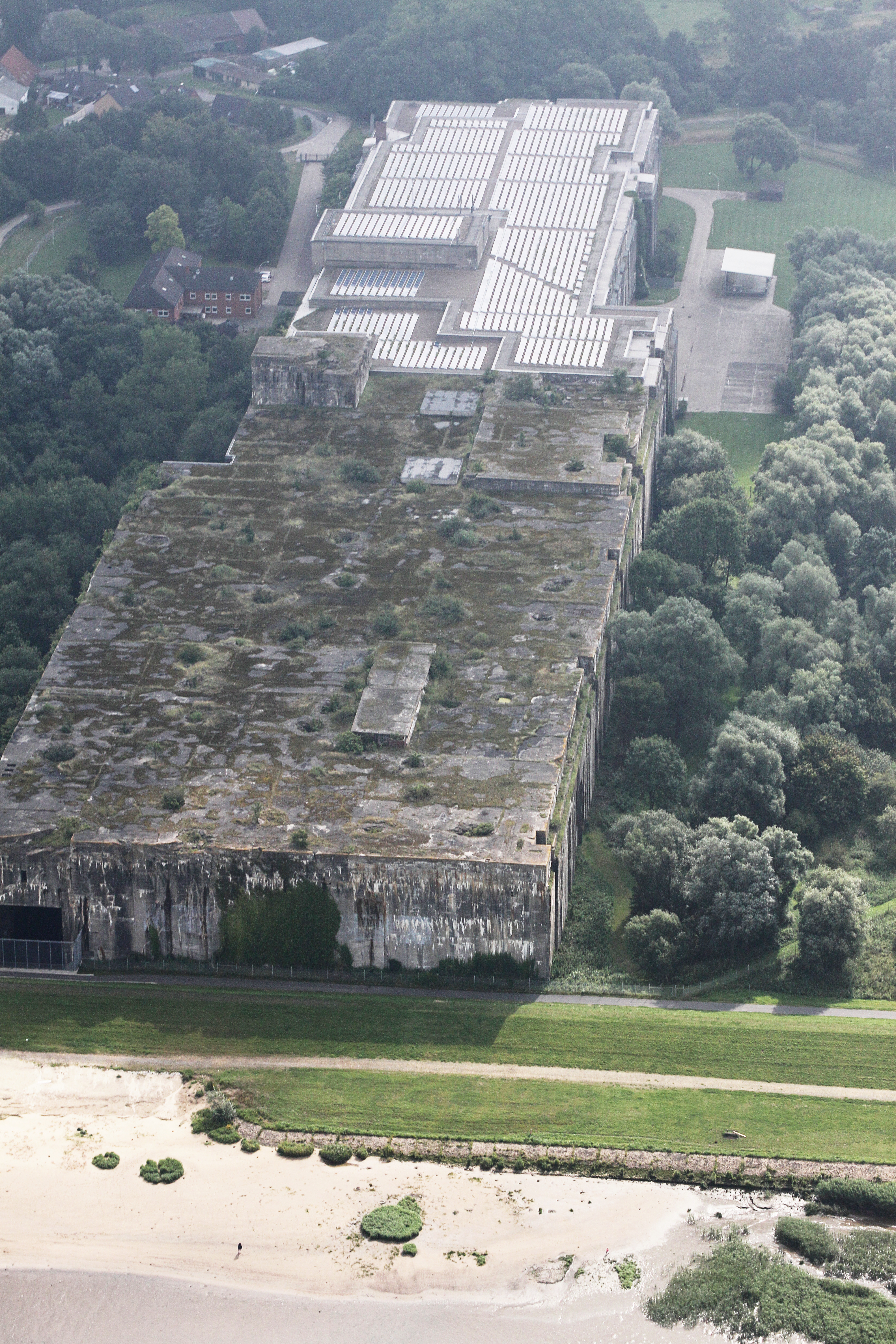 Fotoflug Bremen; Flughöhe 500 m; vom U-Boot Bunker Valentin in Bremen-Nord (Bremen-Blumenthal) die WEser entlang nach Elsfleth